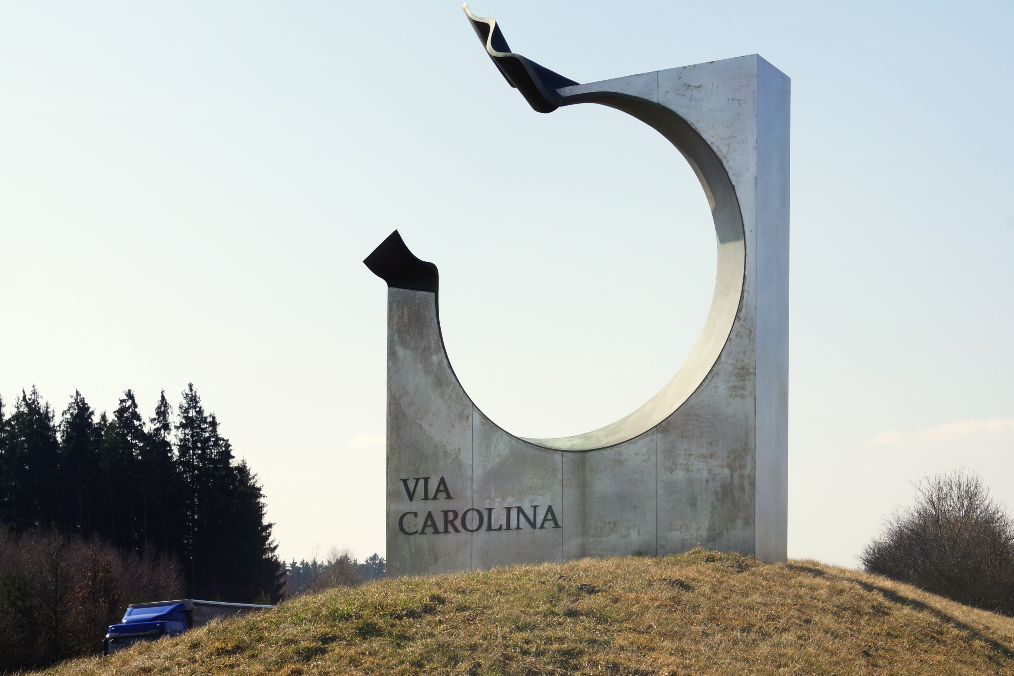 Plastika Via Carolina od Helmuta Langhammera na dálnici A6 na hraničním přechodu mezi Českem a Německem ve Waidhausu.